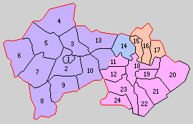 佐賀県杵島郡の町村制時点の町村。